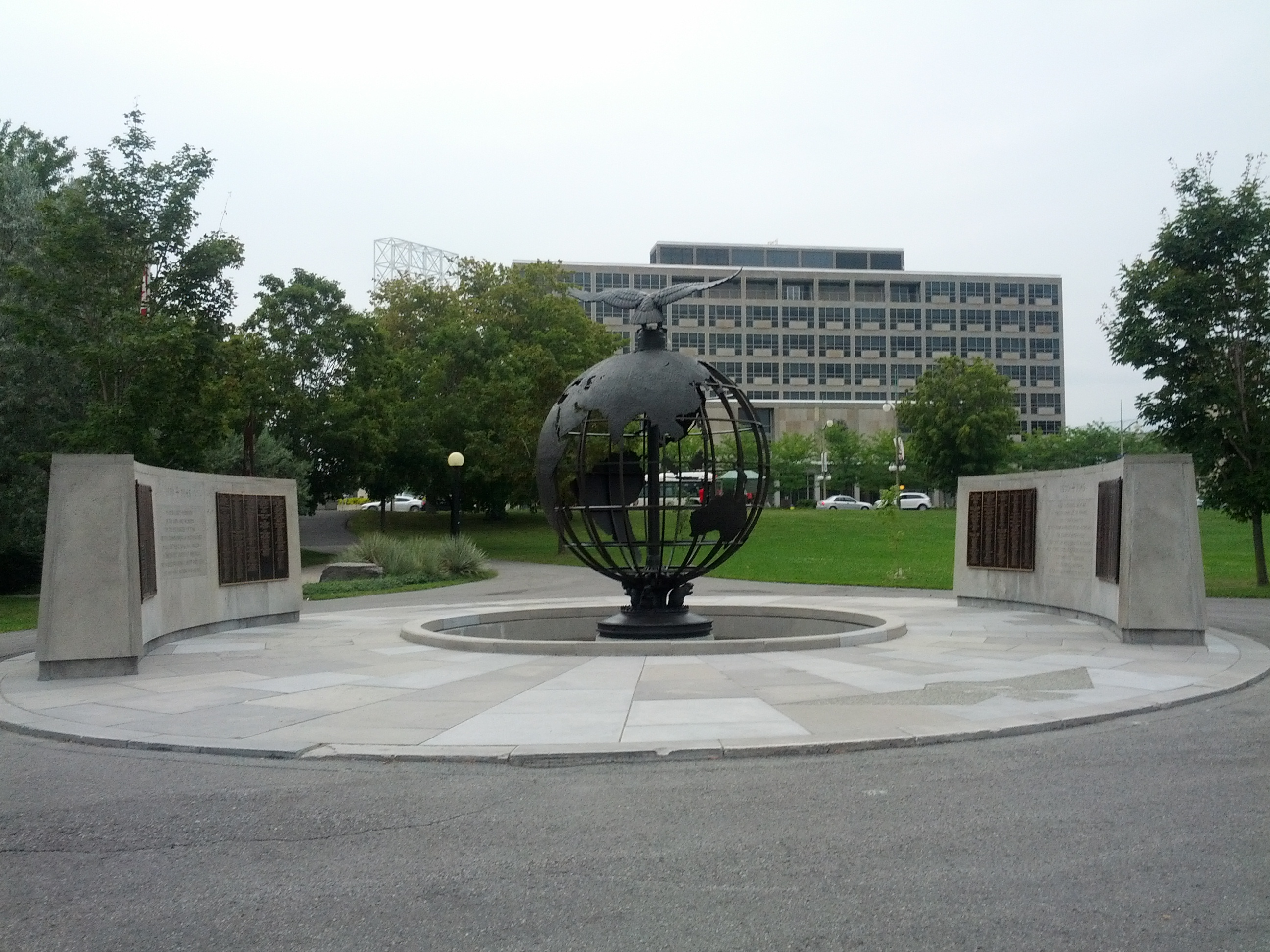 Monumento em Ottawa.